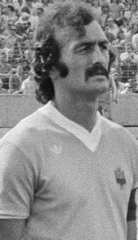 Collectie / Archief : Fotocollectie Anefo Reportage / Serie : [ onbekend ] Beschrijving : Wereldkampioenschap voetbal 1974; Nederland tegen Uruguay 2-0; elftallen tijdens volkslied, nr. 25 Krol en van Hanegem (rechts) Datum : 15 juni 1974 Trefwoorden : VOLKSLIEDEREN, elftallen, sport, voetbal, wereldkampioenschappen Fotograaf : Verhoeff, Bert / Anefo Auteursrechthebbende : Nationaal Archief Materiaalsoort : Negatief (zwart/wit) Nummer archiefinventaris : bekijk toegang 2.24.01.05 Bestanddeelnummer : 927-2609